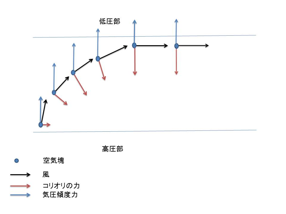 地衡風の略図